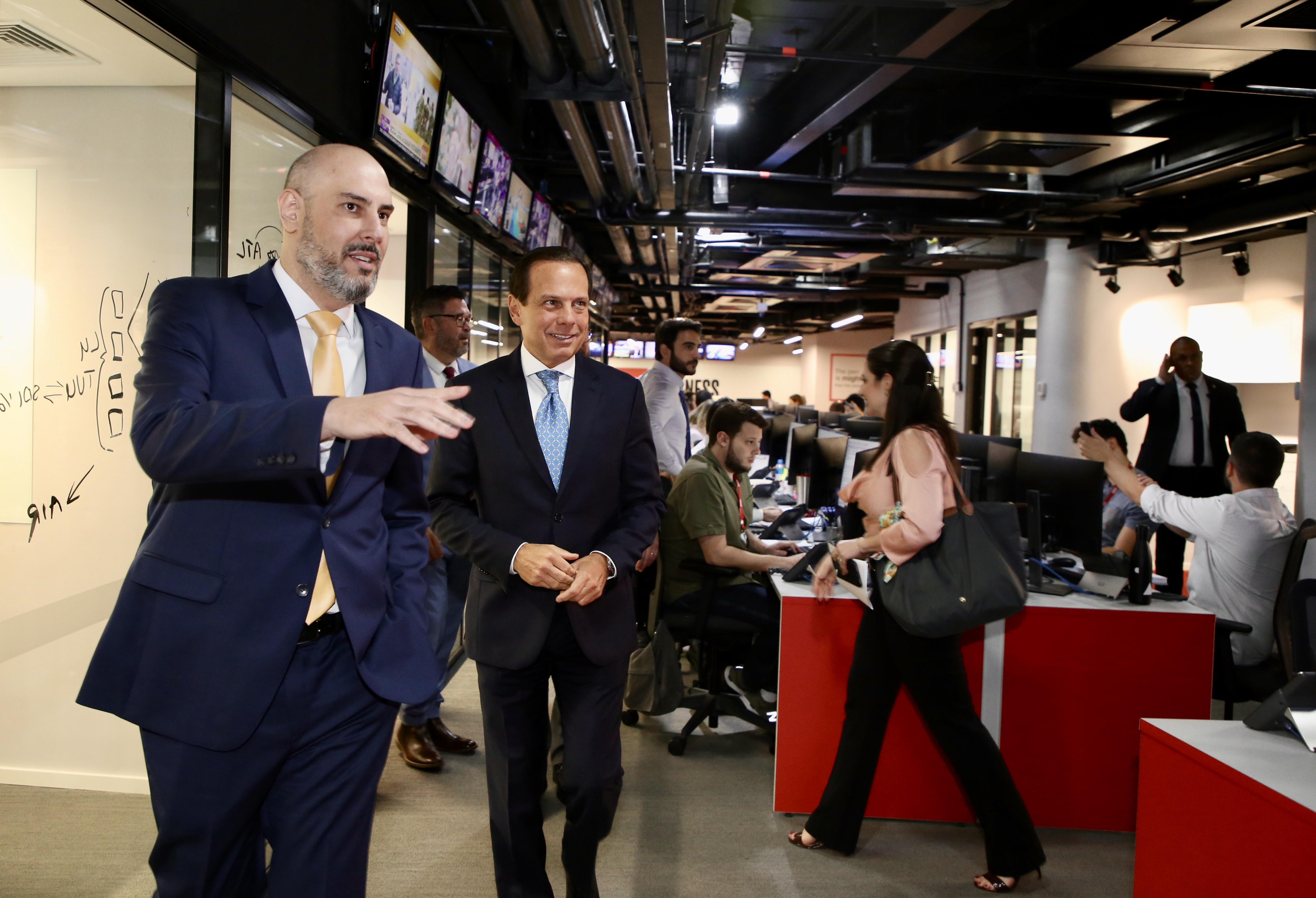 Entrevista para a CNN Brasil